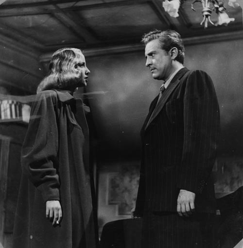 Mirtha Legrand y Arturo de Córdova en la película Pasaporte a Río